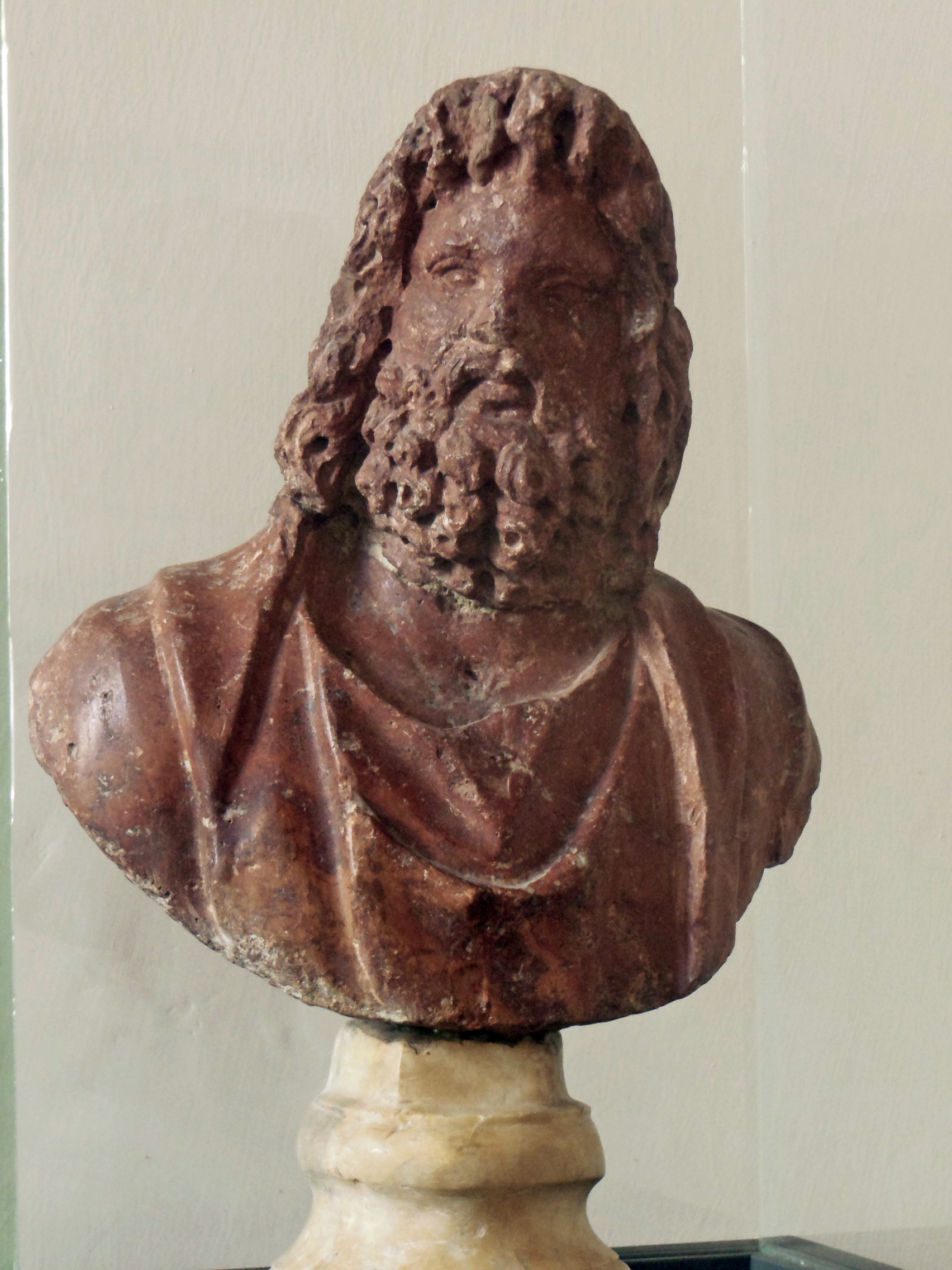 Roma, Museo nazionale romano a palazzo Altemps, busto di Serapide in marmo rosso antico dal museo Kircheriano. Datato alla fine del II o agli inizi del III secolo